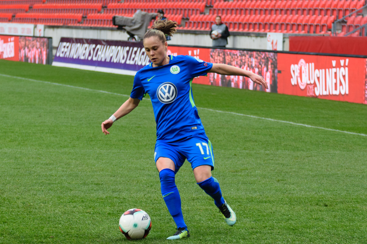 Ewa Pajor at Slavia Prague vs VfL Wolfsburg